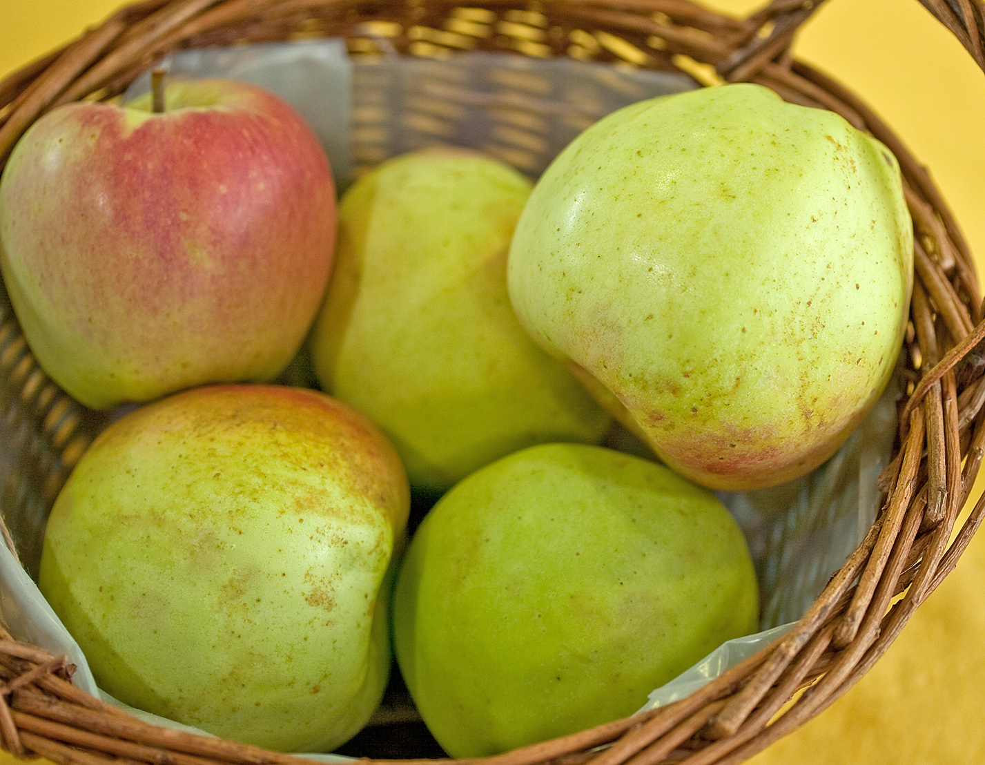 Der Adersleber Kalvill ist eine Apfelsorte